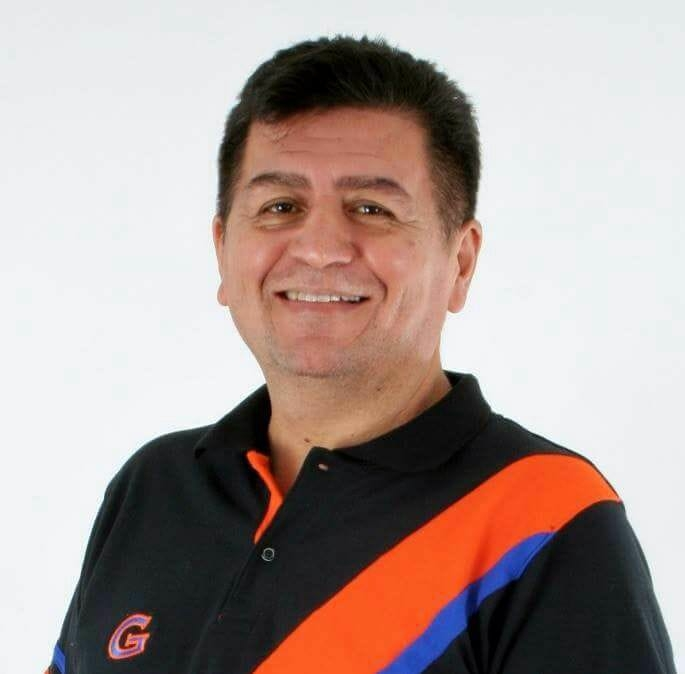 Alcalde